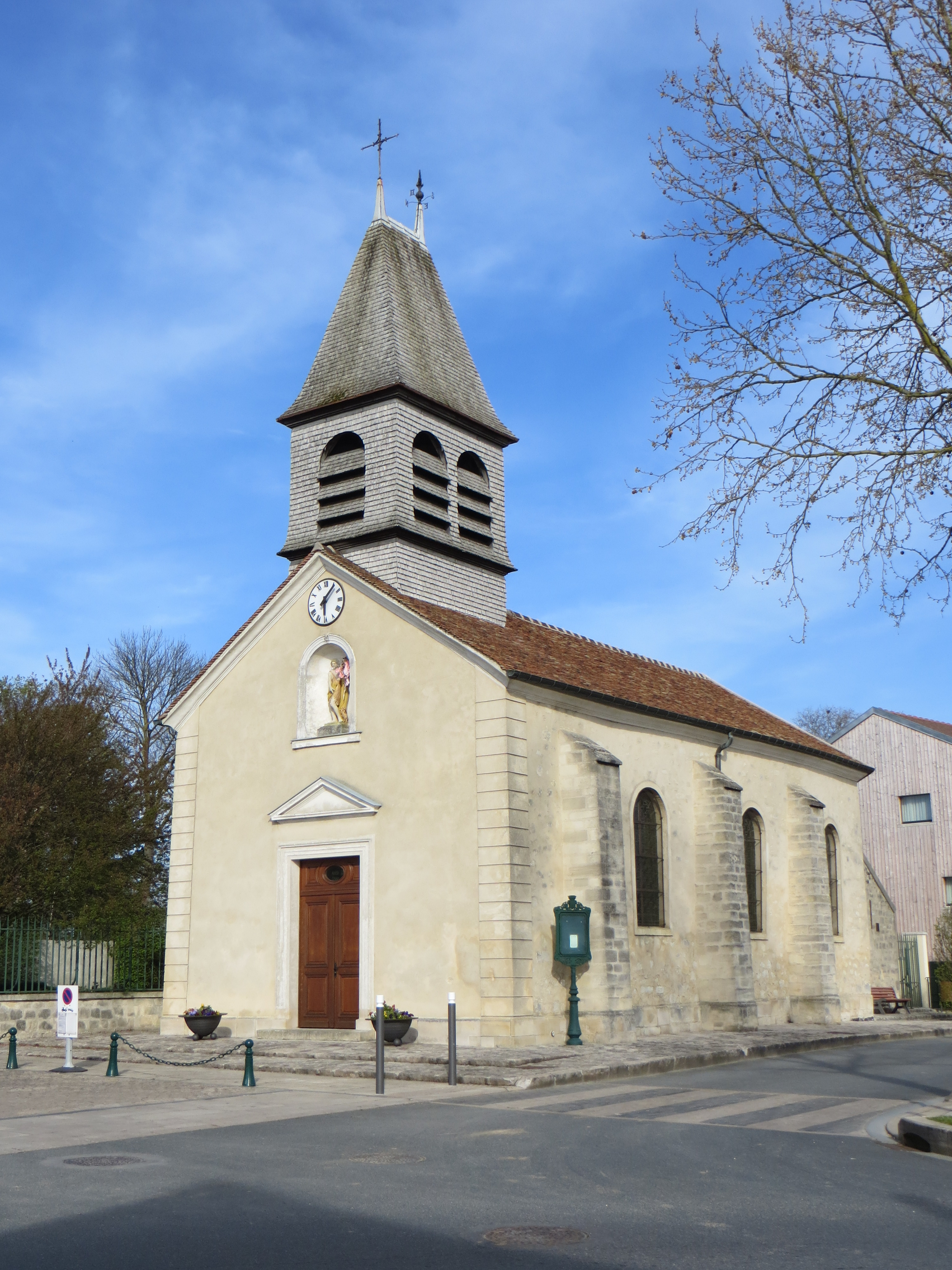 Vue de l'église Saint-Jean-Baptiste